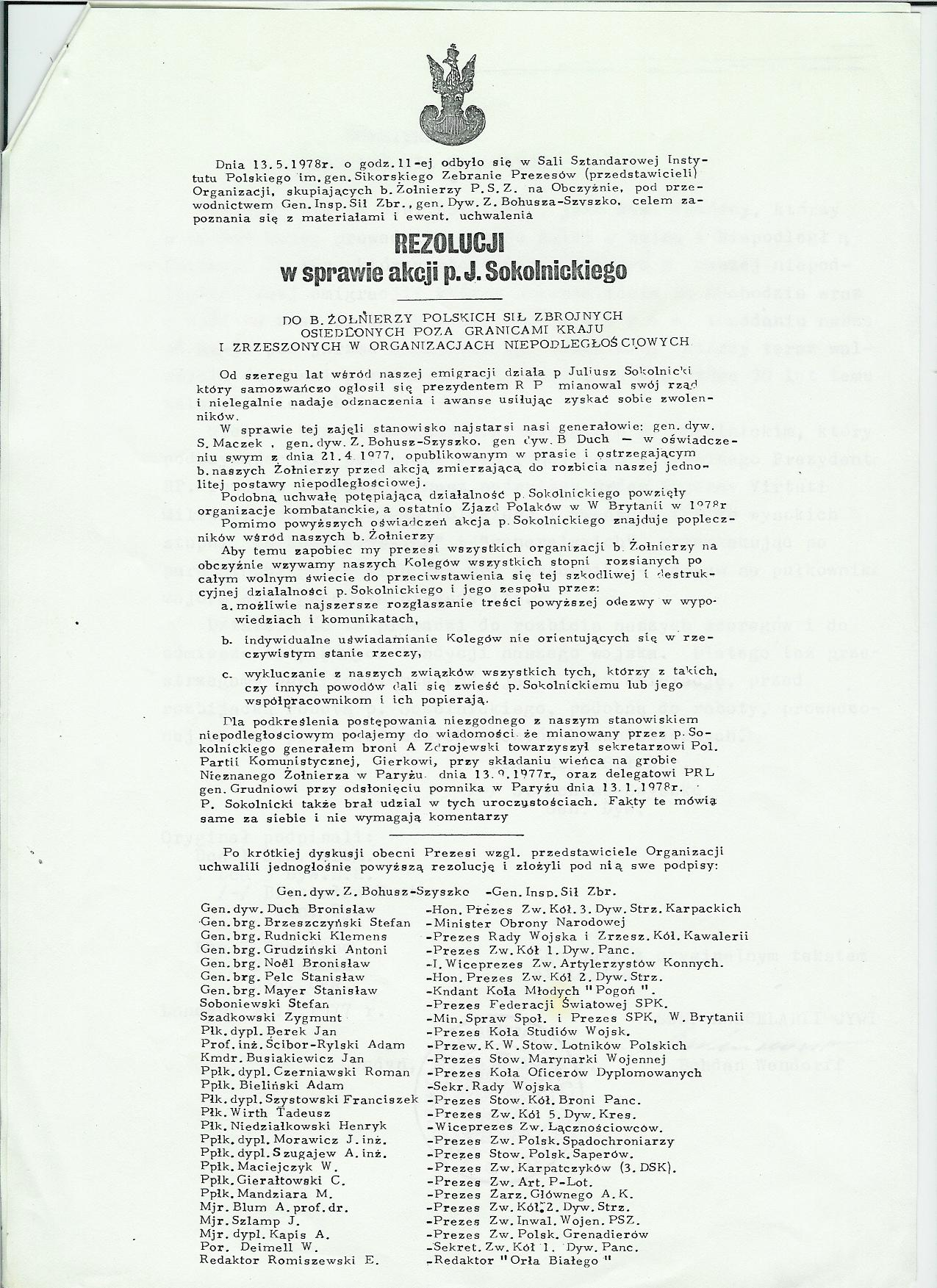 Rezolucja Prezesów organizacji PSZ w sprawie Sokolnickiego